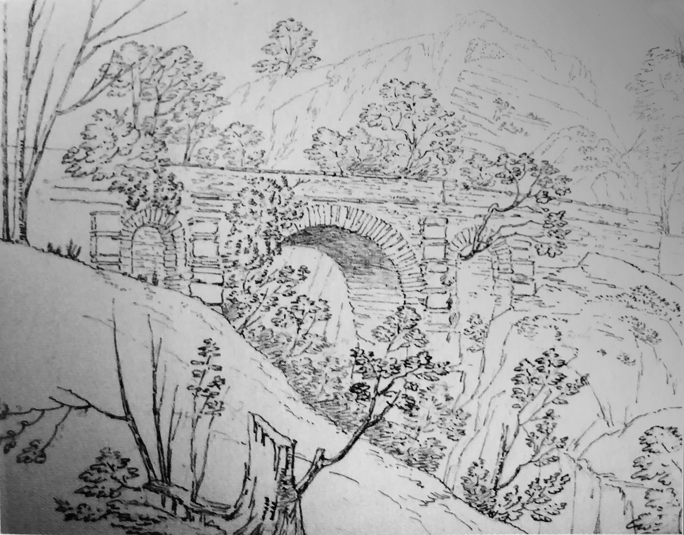 incisione raffigurante il ponte romano di Saint-Vincent prima del crollo